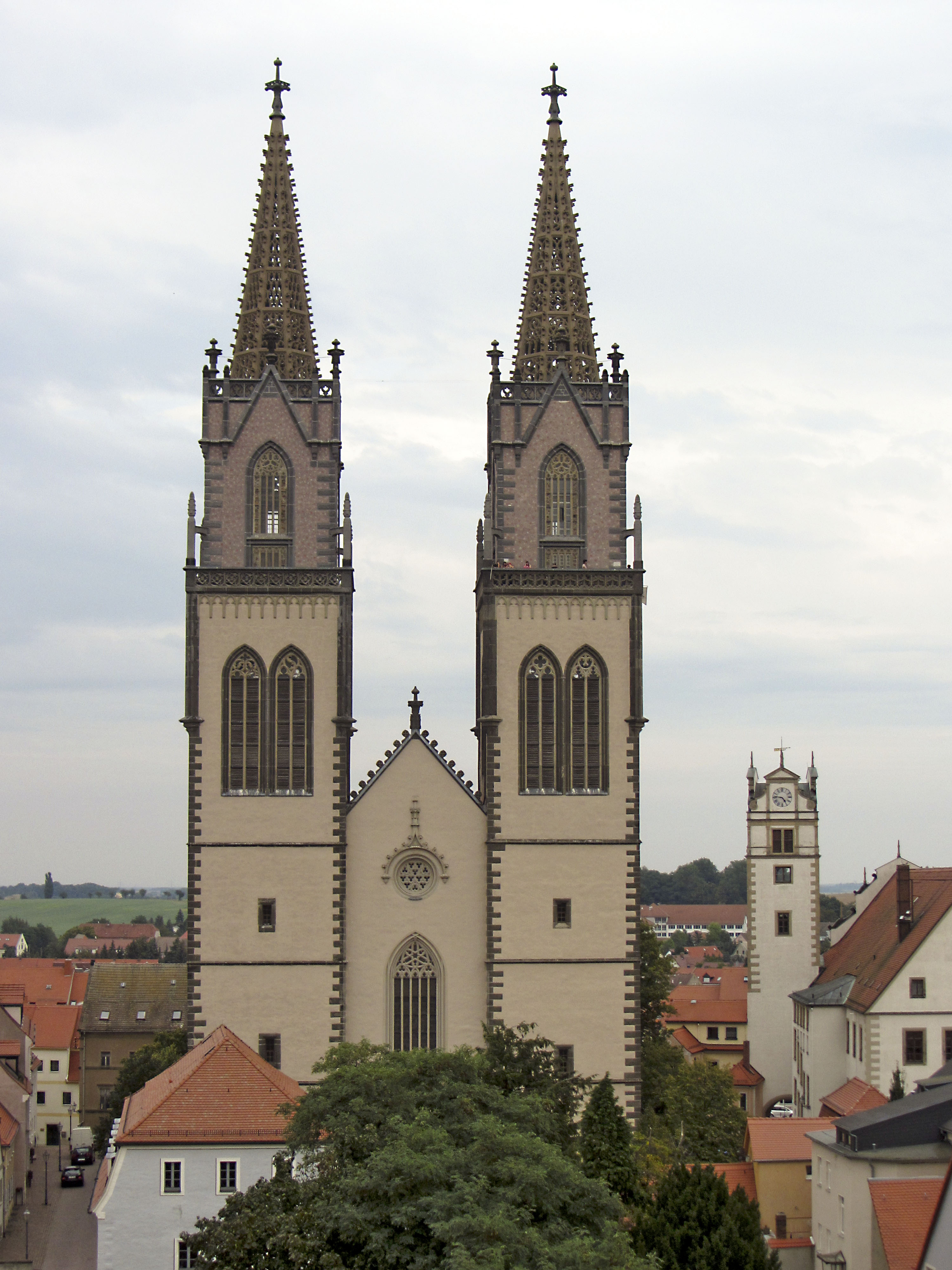 St.-Aegidien-Kirche, Kirchplatz 11 in Oschatz